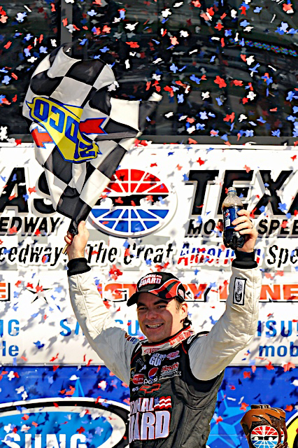 Jeff Gordon saat menang di Texas tahun 2009